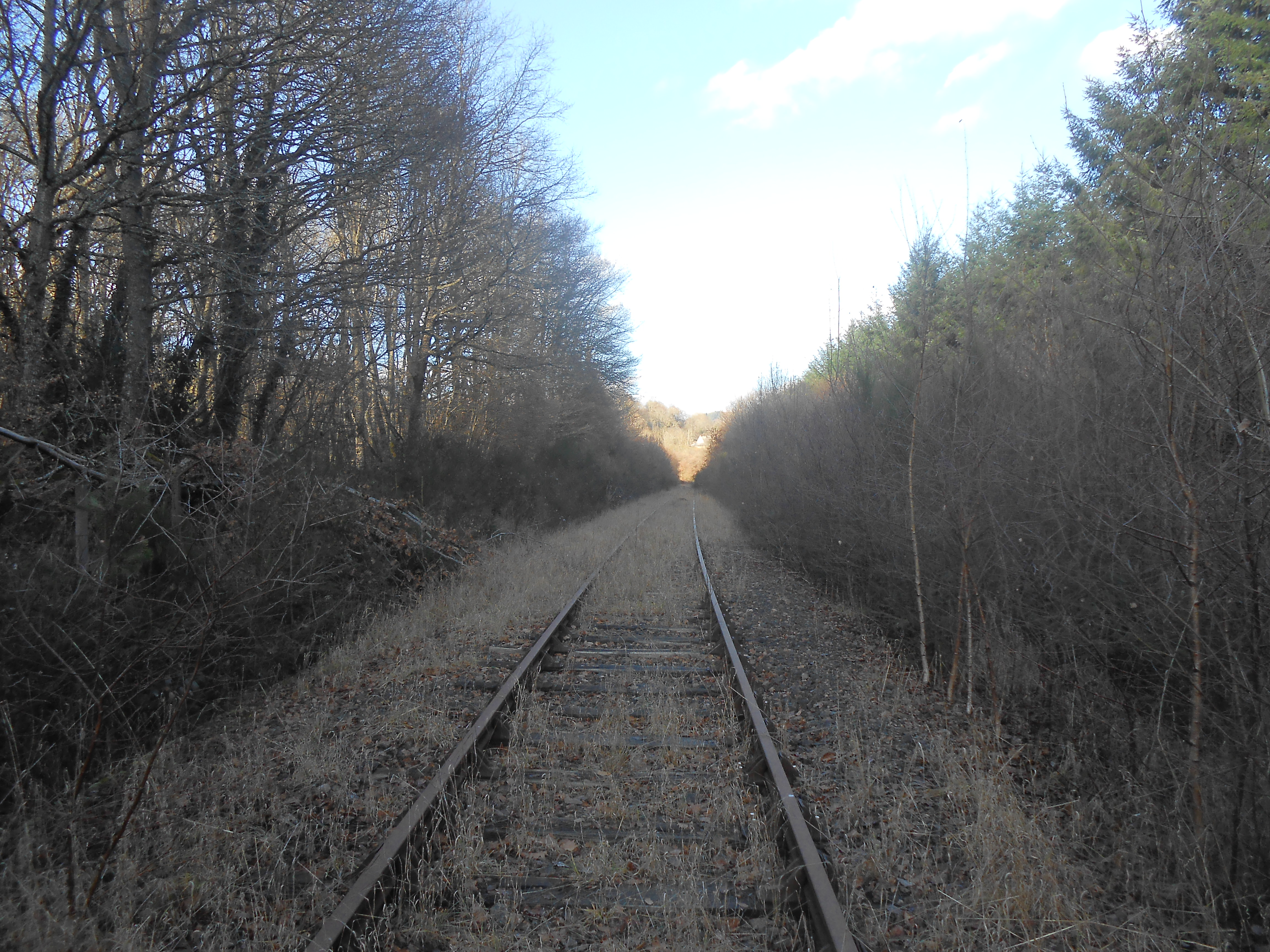 Ancienne voie ferrée.